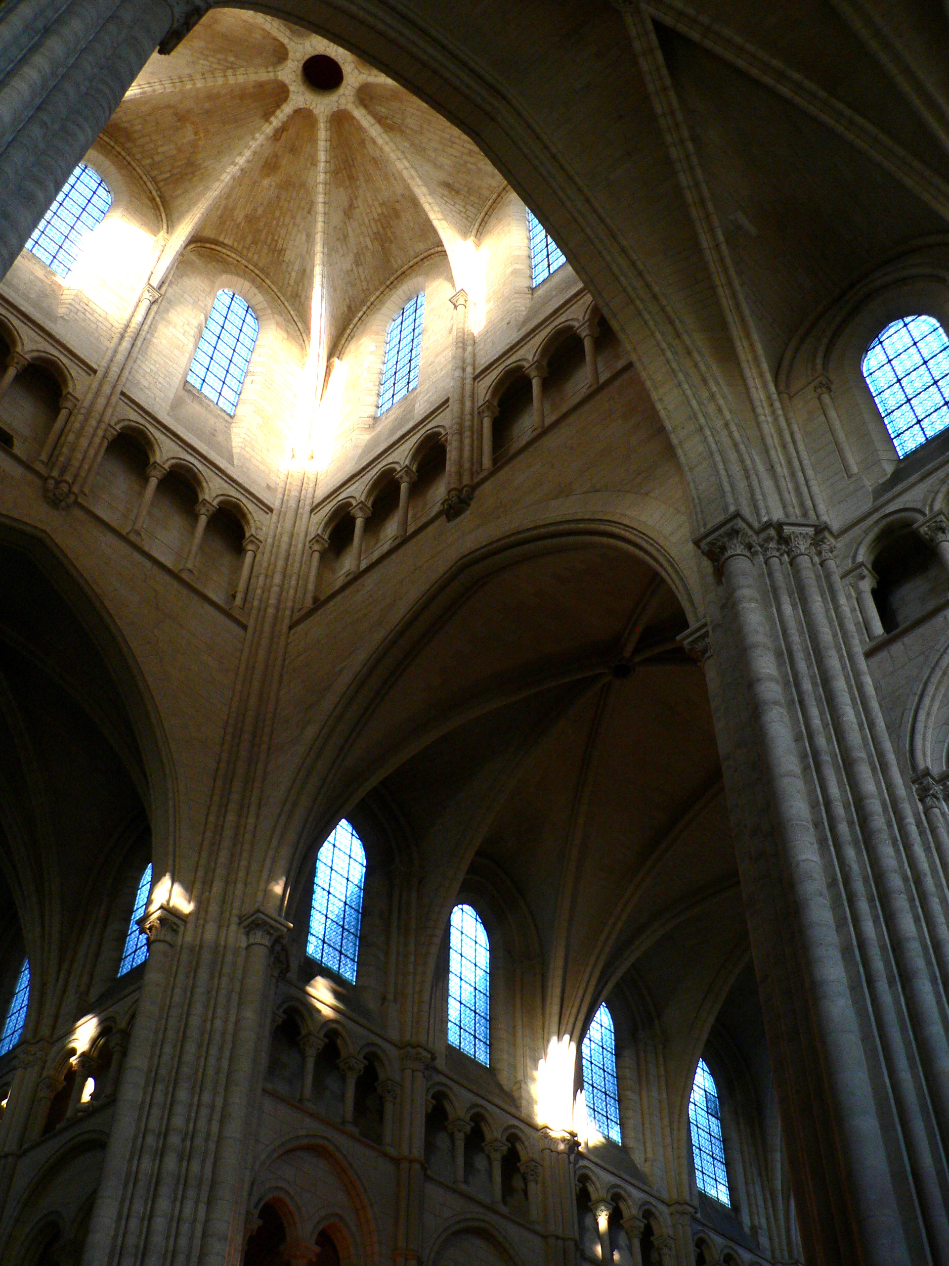 Cathédrale Notre_Dame de Laon, croisée du transept